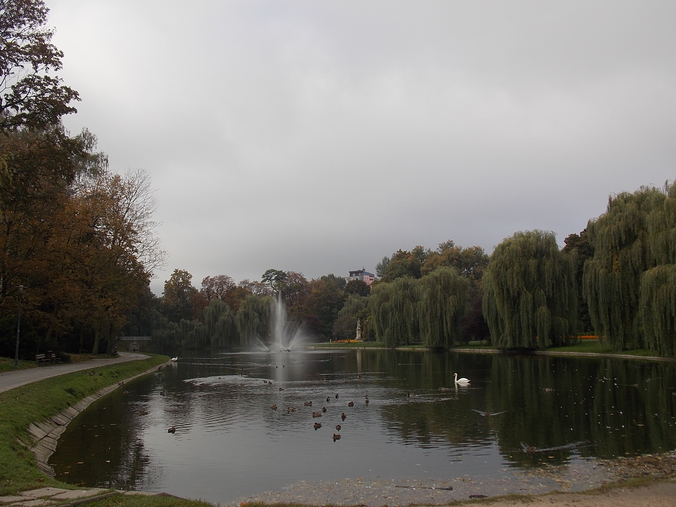 Kielce, park miejski, 1830 r.